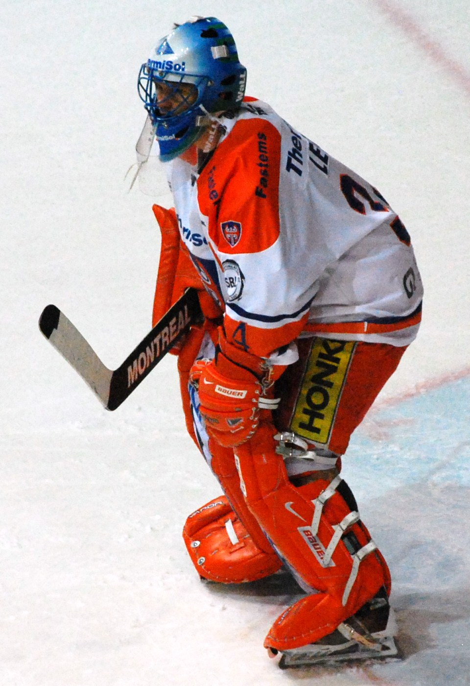 Mika Lehto, Tappara